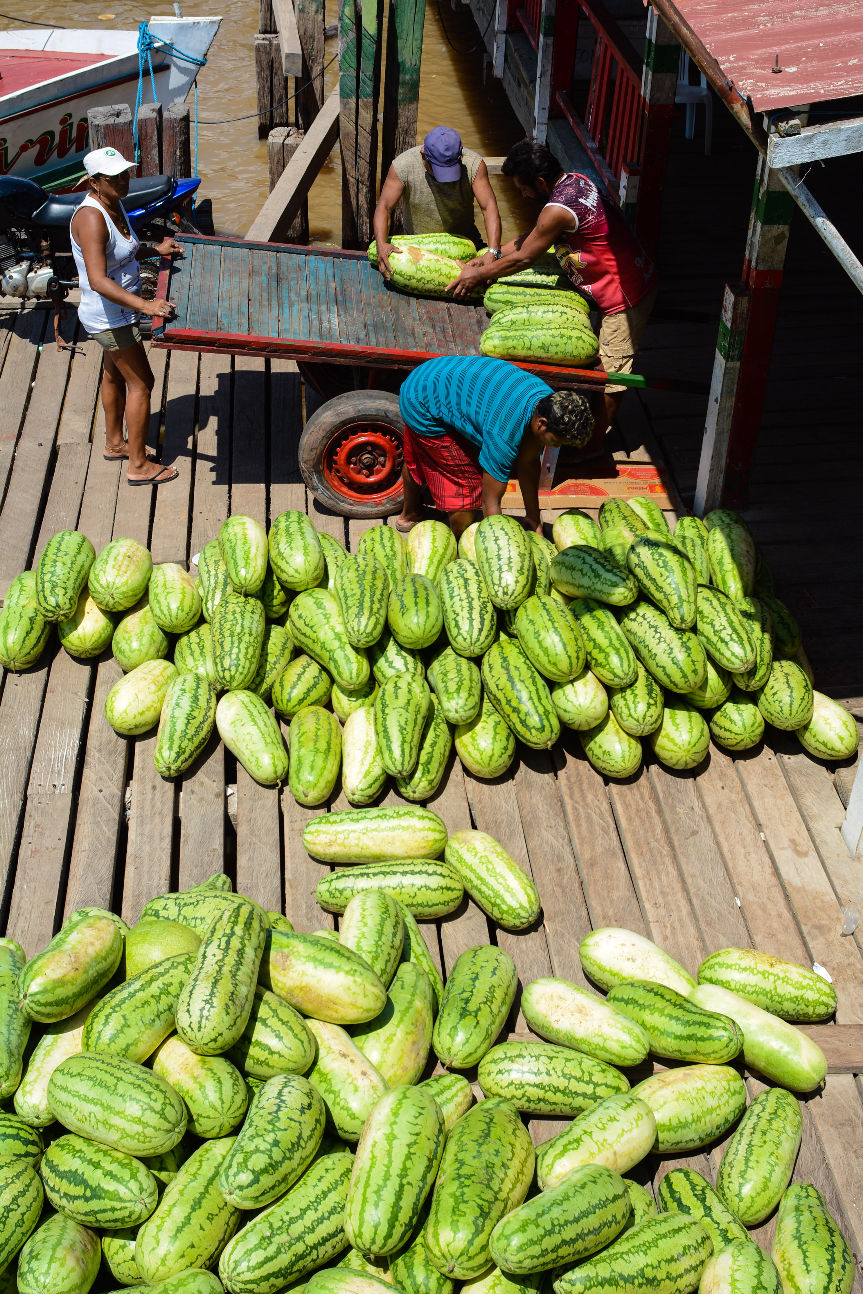 Amazonas, Brasilien